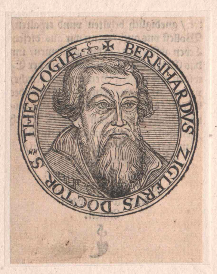 Bernhard Ziegler (født 10. november 1496 på Gauernitz slott i kurfyrstedømmet Sachsen, død 2. februar 1552 i Leipzig) var en tysk reformator, teolog og hebraist som var en sentral person under reformasjonen. Han bidro under arbeidet med den første tyske oversettelsen av bibelen i perioden 1540–1541, og ble en gode venn og støttespiller av både Martin Luther og Philipp Melanchthon.